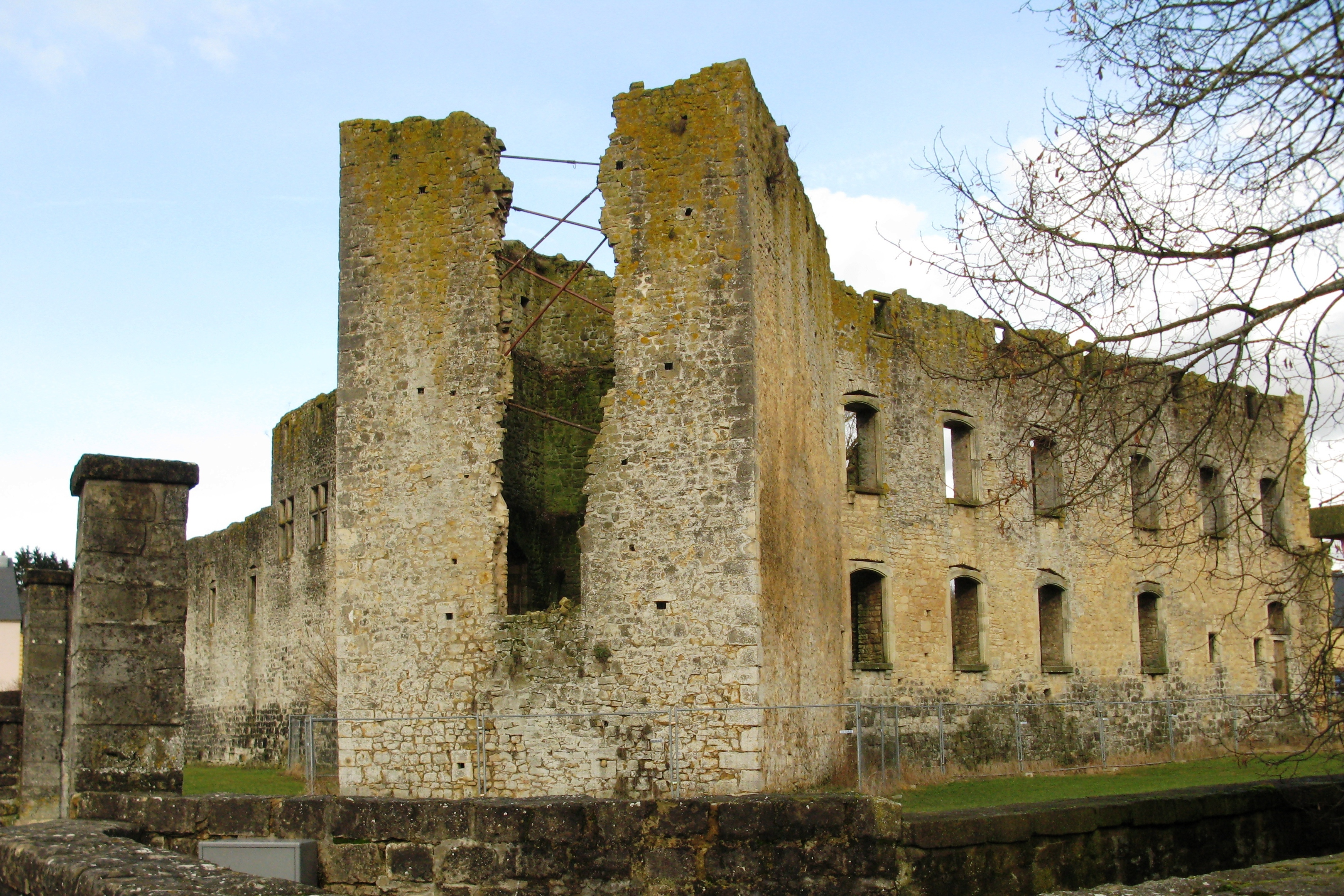 D'Gréiveschlass zu Käerch